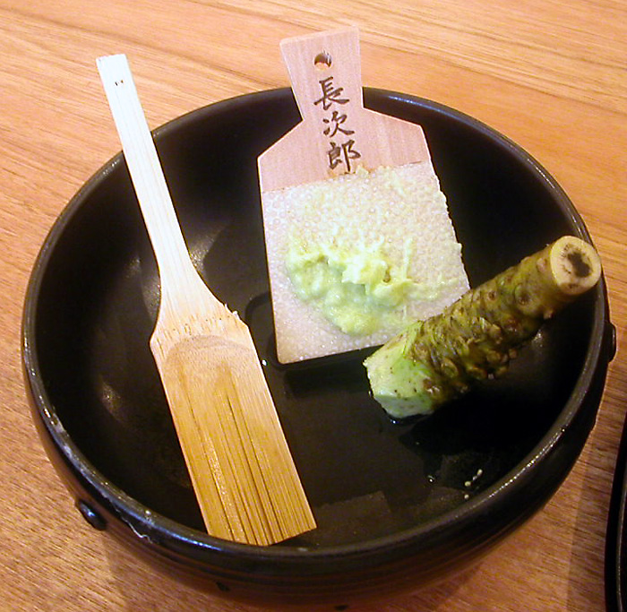 撮影者：小太刀 ワサビとワサビおろしとヘラ（ワサビをすった後） Image:CodazziWasabi1.jpgでワサビをすった後です。これから向かって左にある竹のヘラをつかってワサビを入れ物に移します。